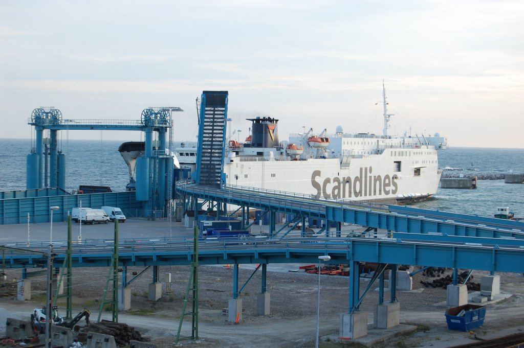 Trelleborg Harbour Ferry Götaland